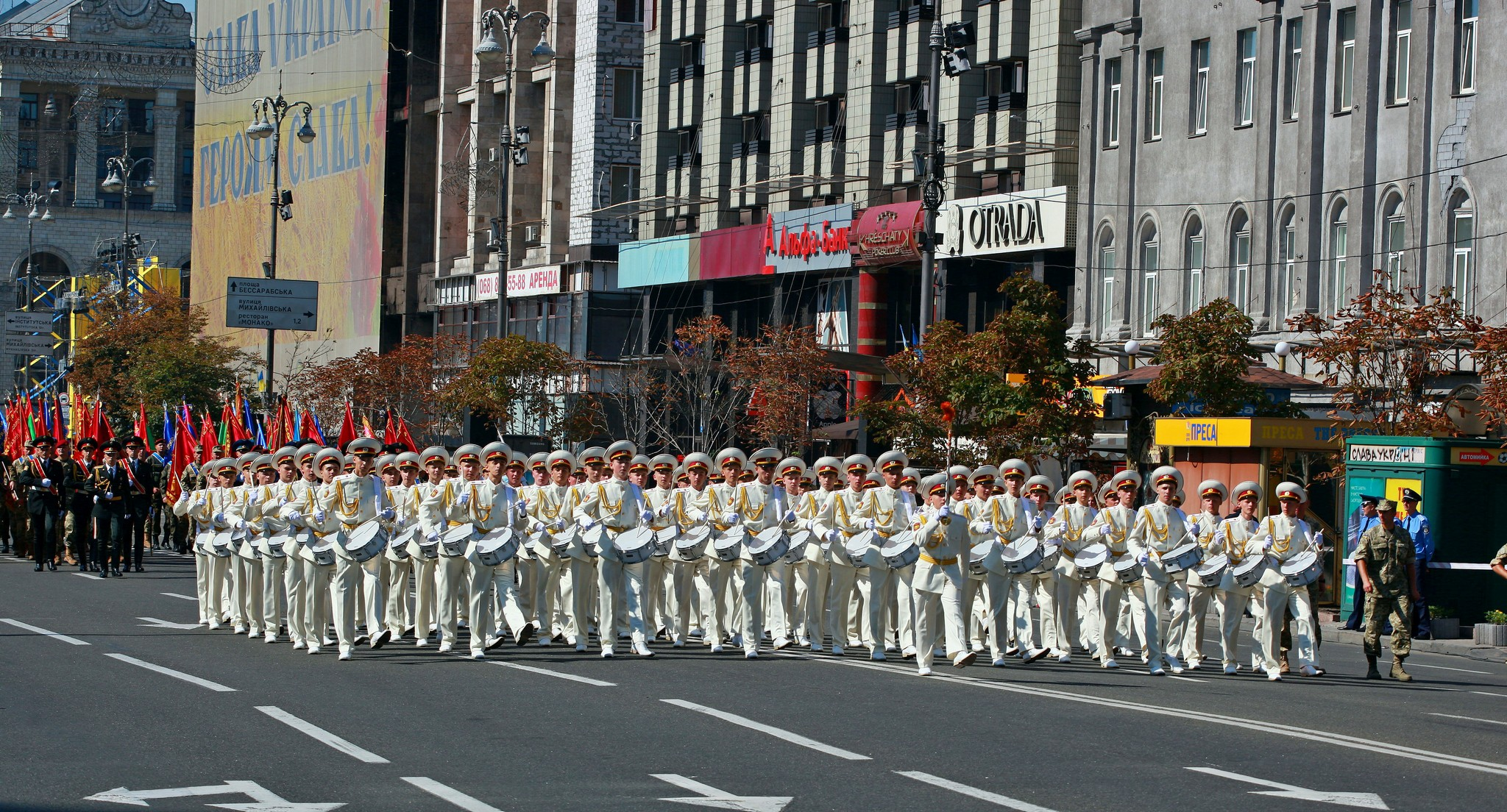 День Незалежності України 2015